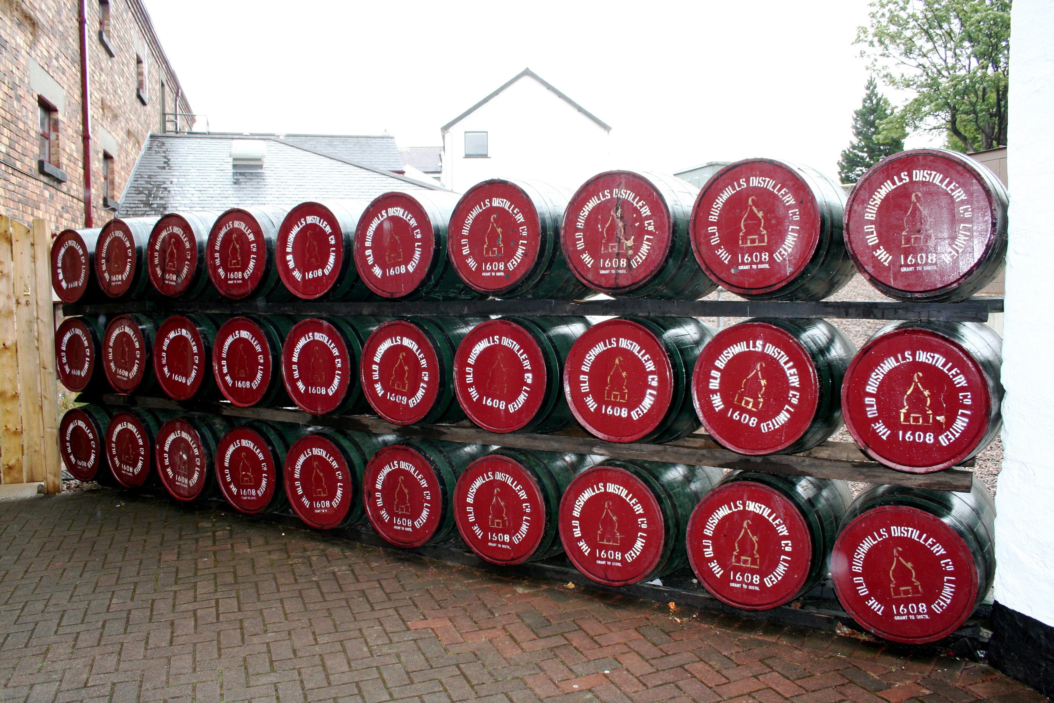 Bushmills